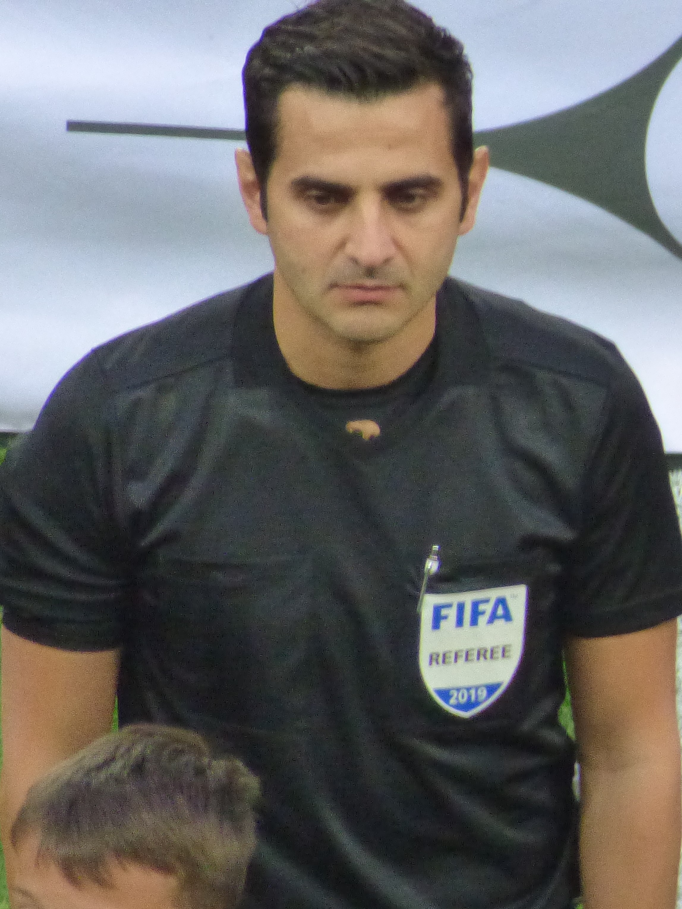 Fedayi San avant le match Lens-Valenciennes, comptant pour la 32ème journée du championnat de France de football de Ligue 2 2018-2019, le 12 avril 2019, au Stade Bollaert-Delelis.